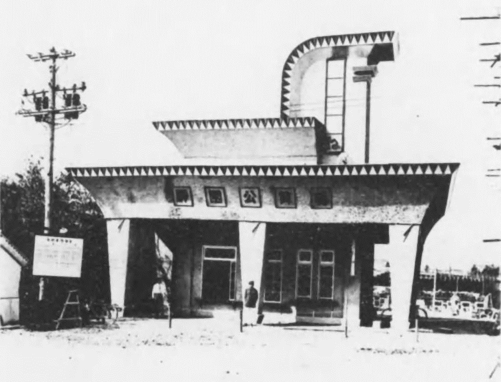 名古屋勧業協会 編『御大典奉祝名古屋博覧会総覧』名古屋勧業協会、1929年8月31日（国立国会図書館デジタルコレクションによる）